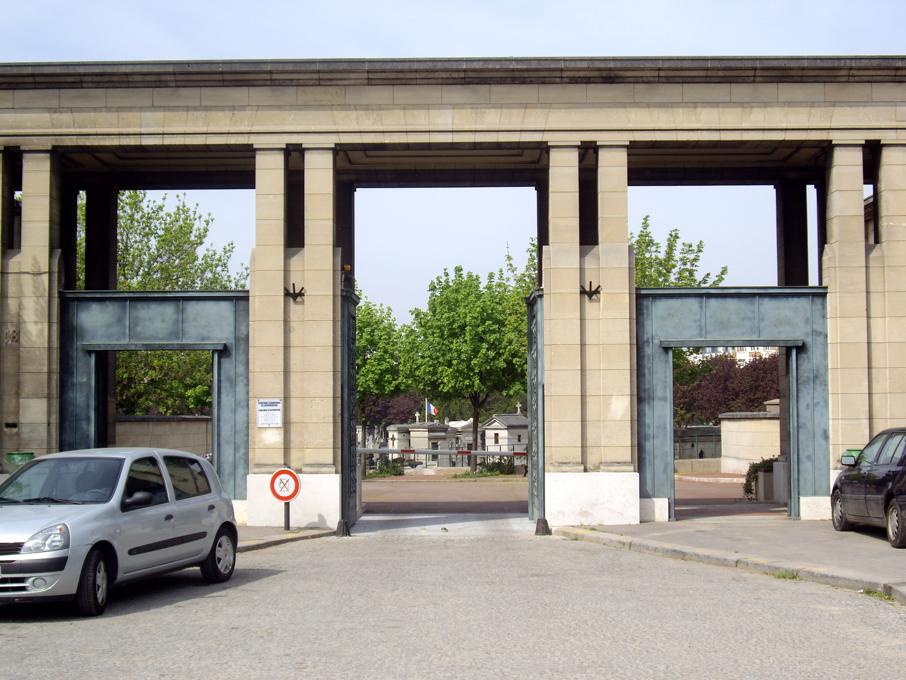 Cimetière de Montrouge. Entrée au 18 avenue de la Porte-de-Montrouge, Paris 14e.